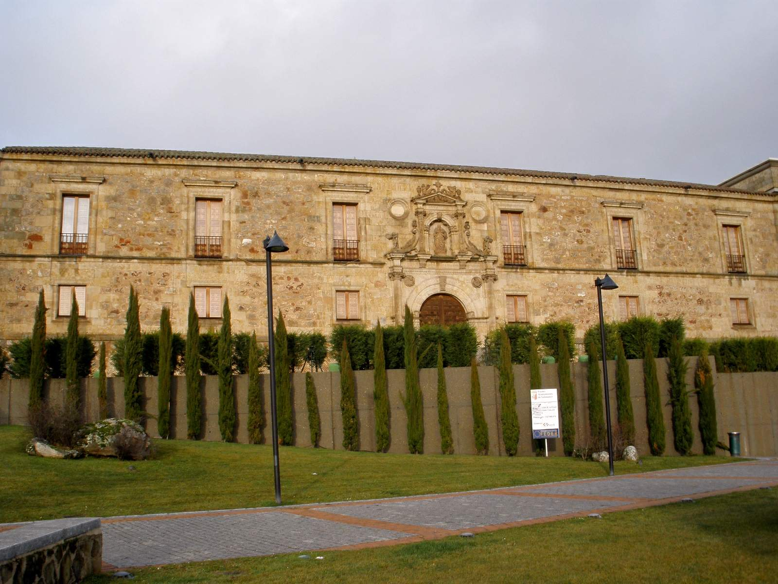 Salamanca - Colegio de la Purísima Concepción de los Niños Huérfanos